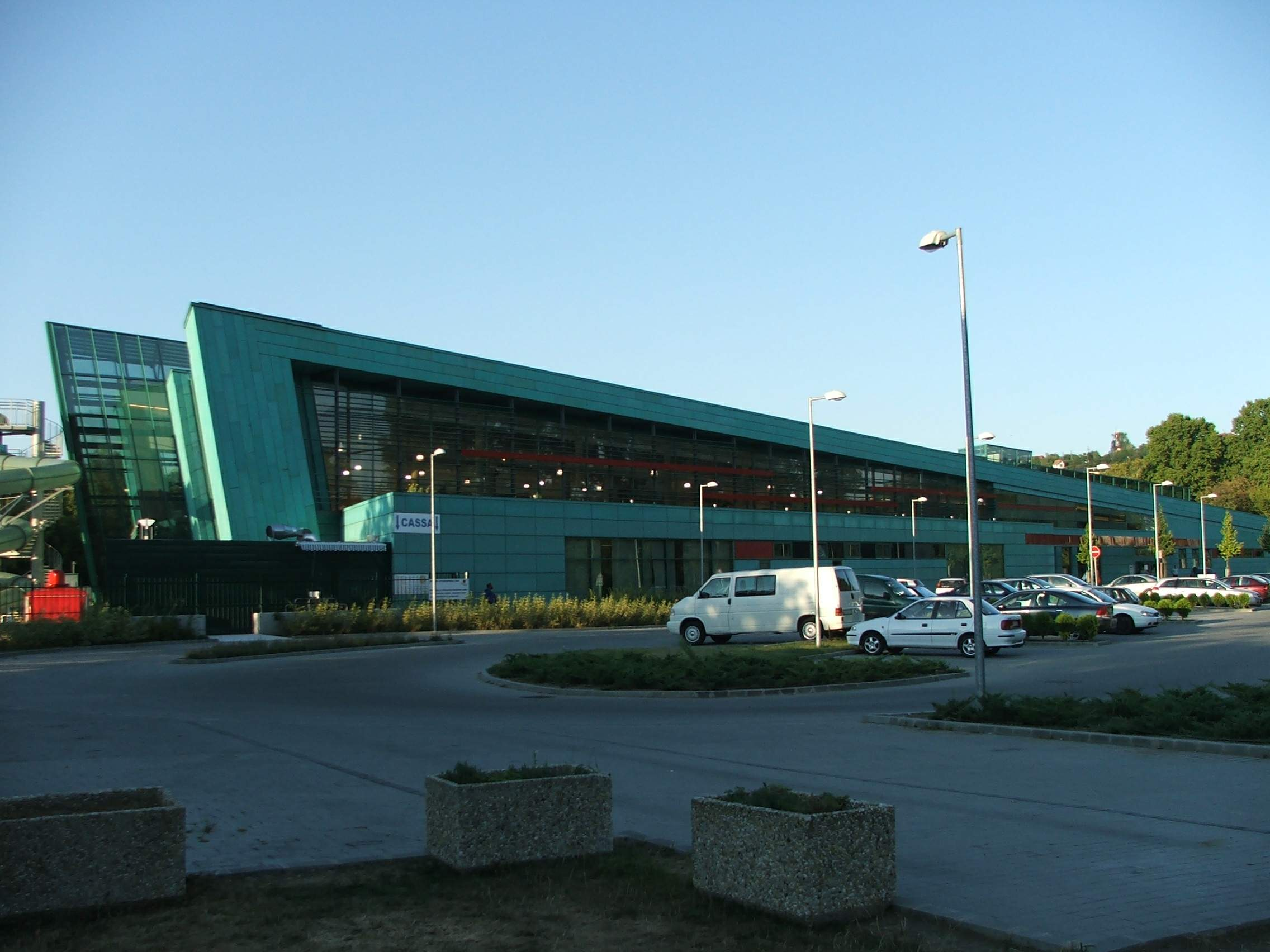 The Aquasziget in Esztergom, Hungary